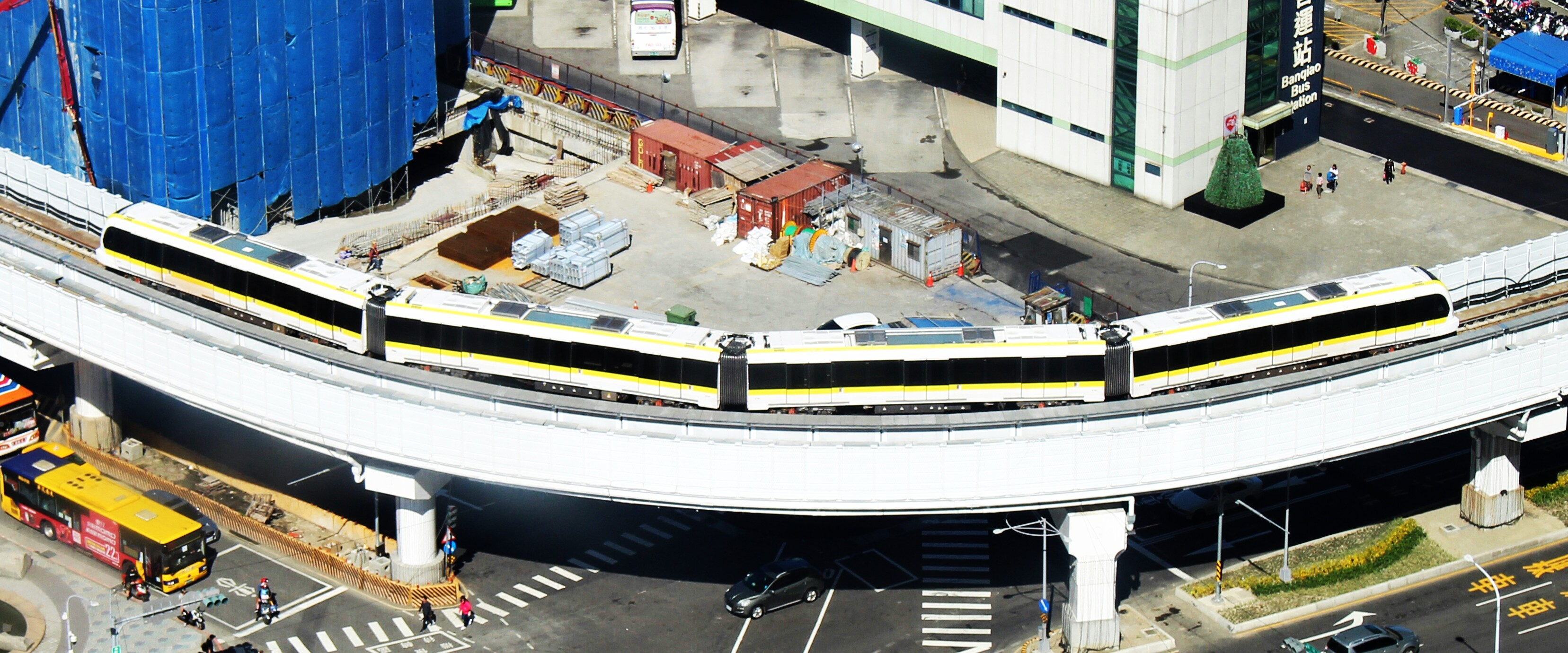 2018年11月25日台北捷運環狀線列車試車畫面